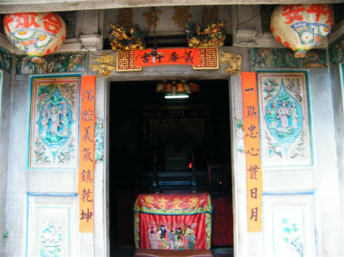 达濠陆厝池关爷宫